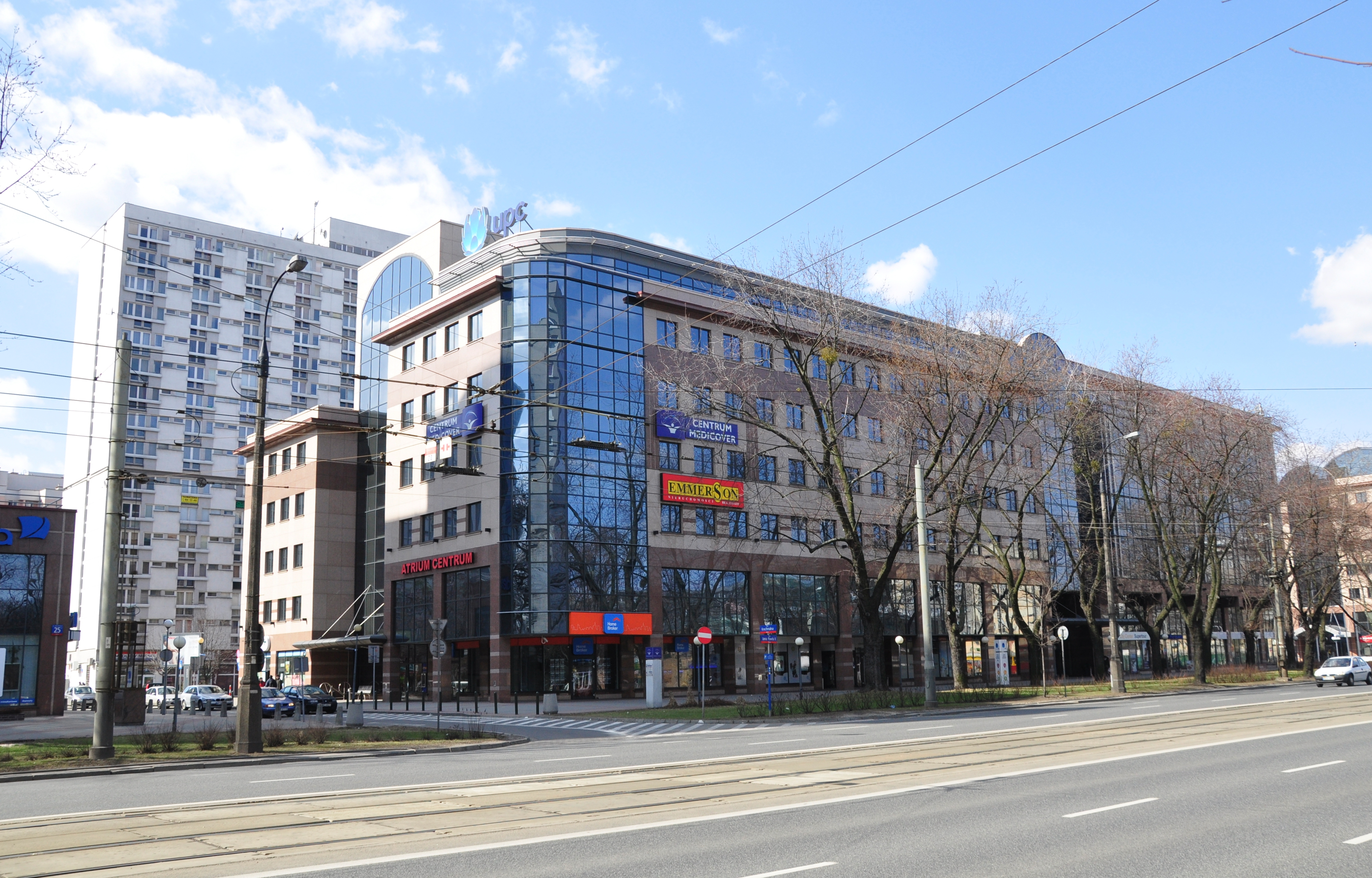 Warschau, Atrium